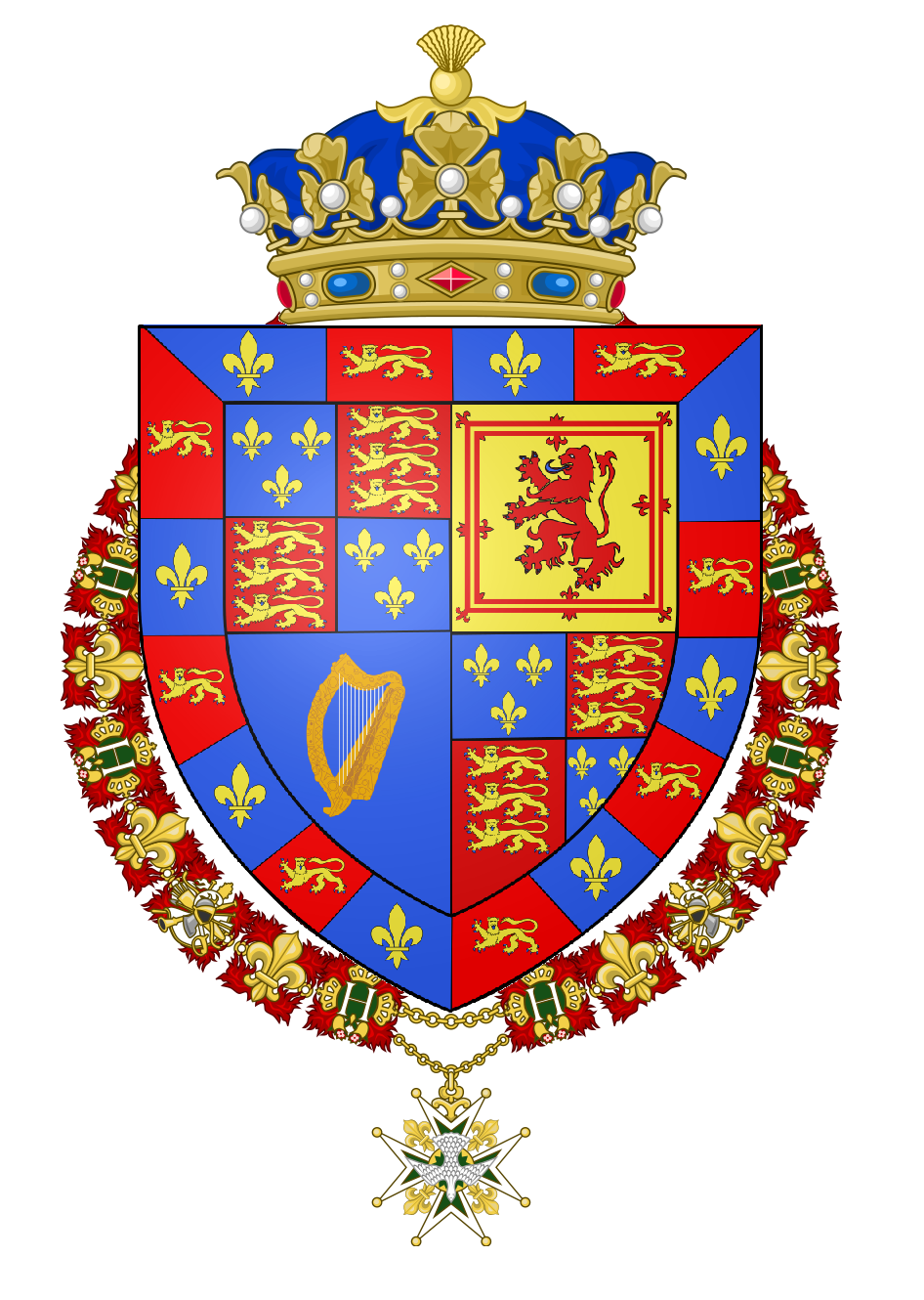 Armoiries des ducs de Fitz-James dans la pairie française